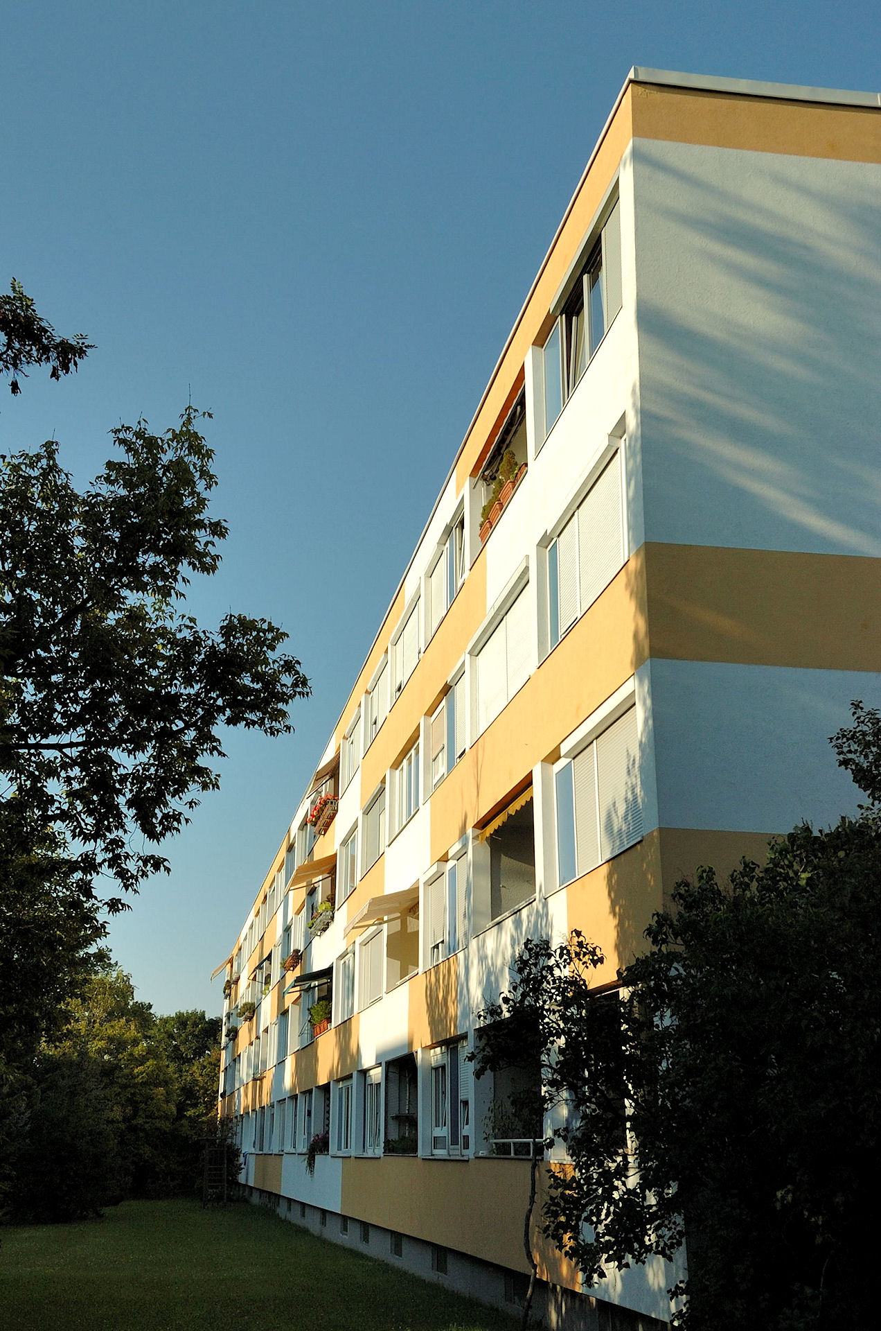 Maria Enzersdorf Südstadt, Mehrfamilienwohnhaus Hohe-Wand-Straße, renovierte Fassade